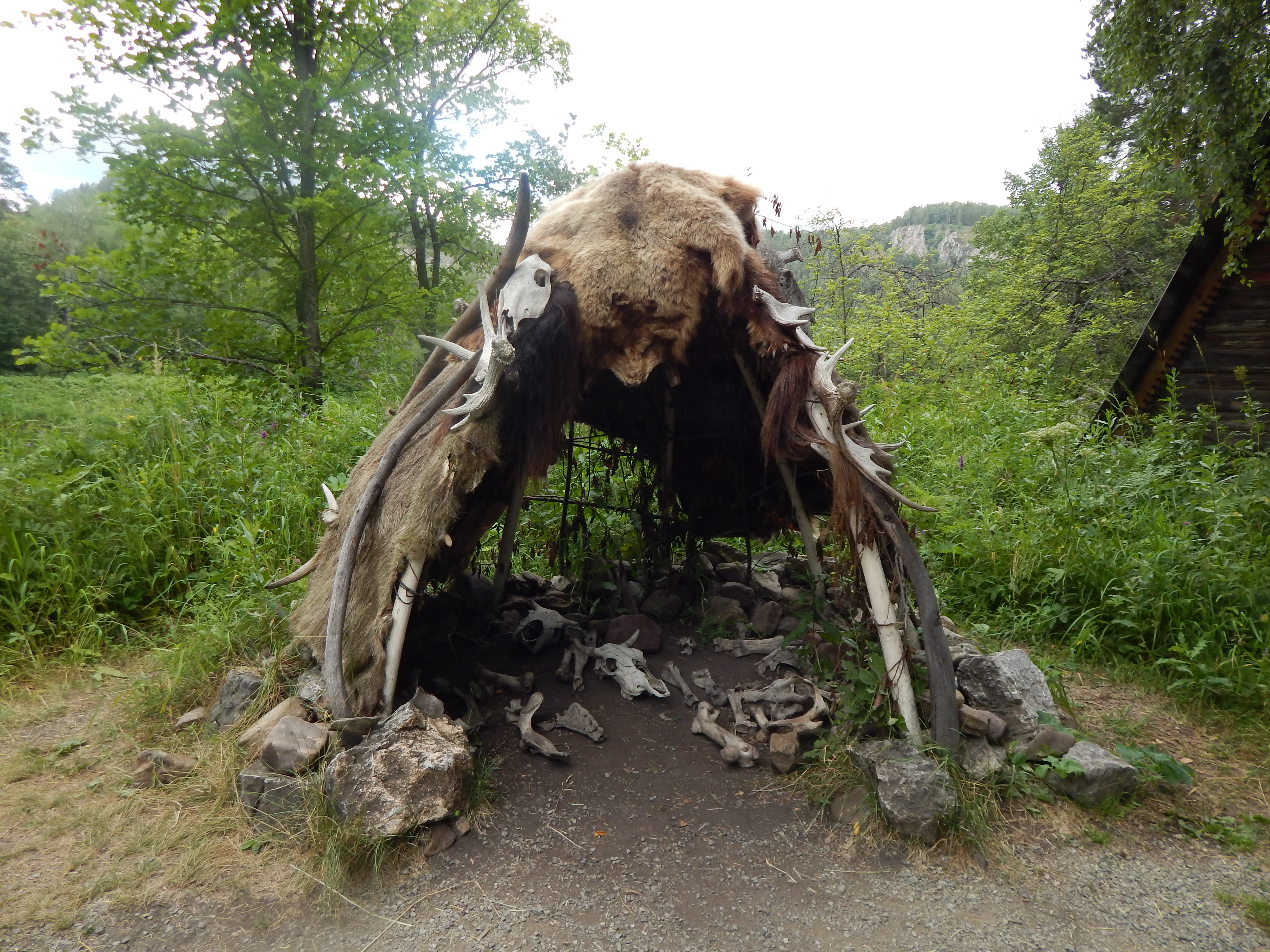 Шалаш из шкур животных по дороге в пещеру Шульганташ